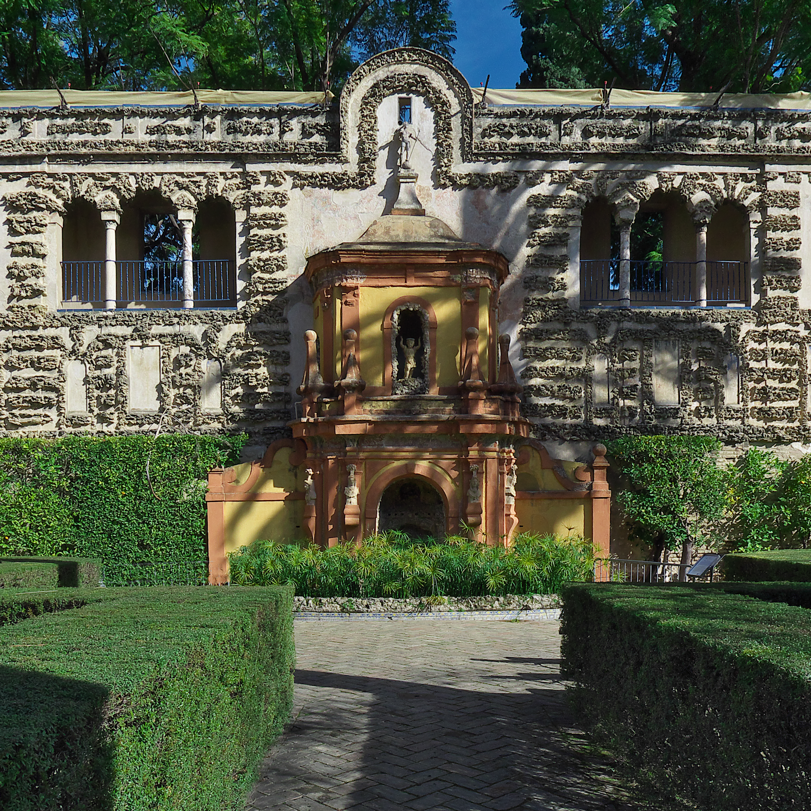 Órgano de agua, también llamada Fuente de la Fama . Única fuente de este tipo que se conserva en España, instalada en los jardines de los Reales Alcázares en el siglo XVII (1610-1614) bajo proyecto de Vermondo Resta.